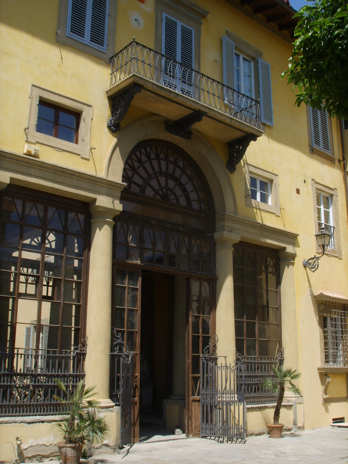 Palazzo Ximenes panciatichi da sangallo, retro